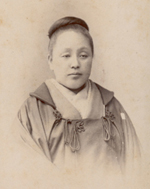 新島 八重